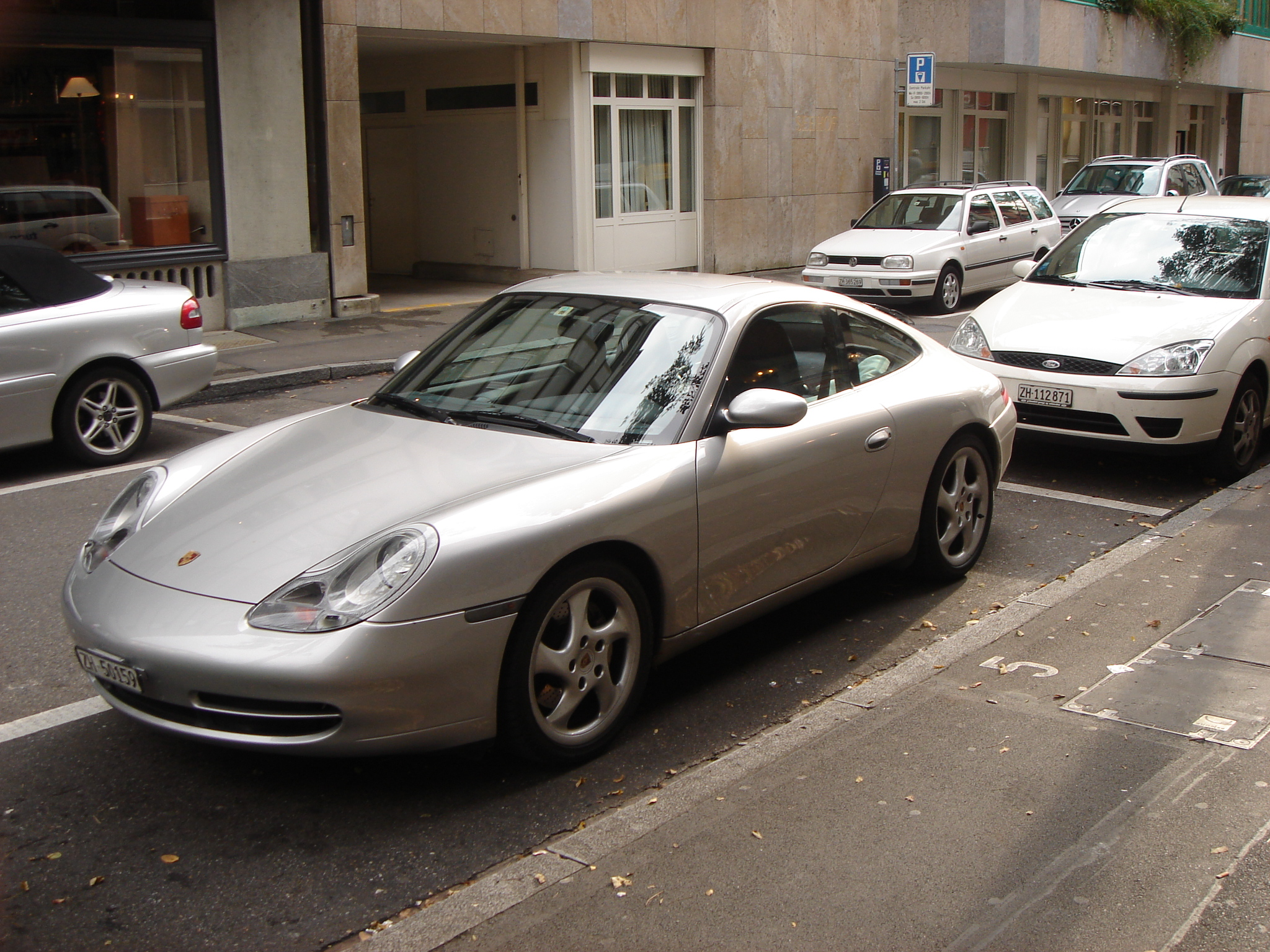 Porsche 911 Carrera 996 silverPorsche 911